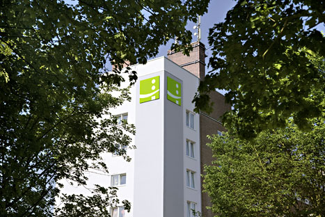 OP-Aufzug des Evangelischen Krankenhauses in Wesel